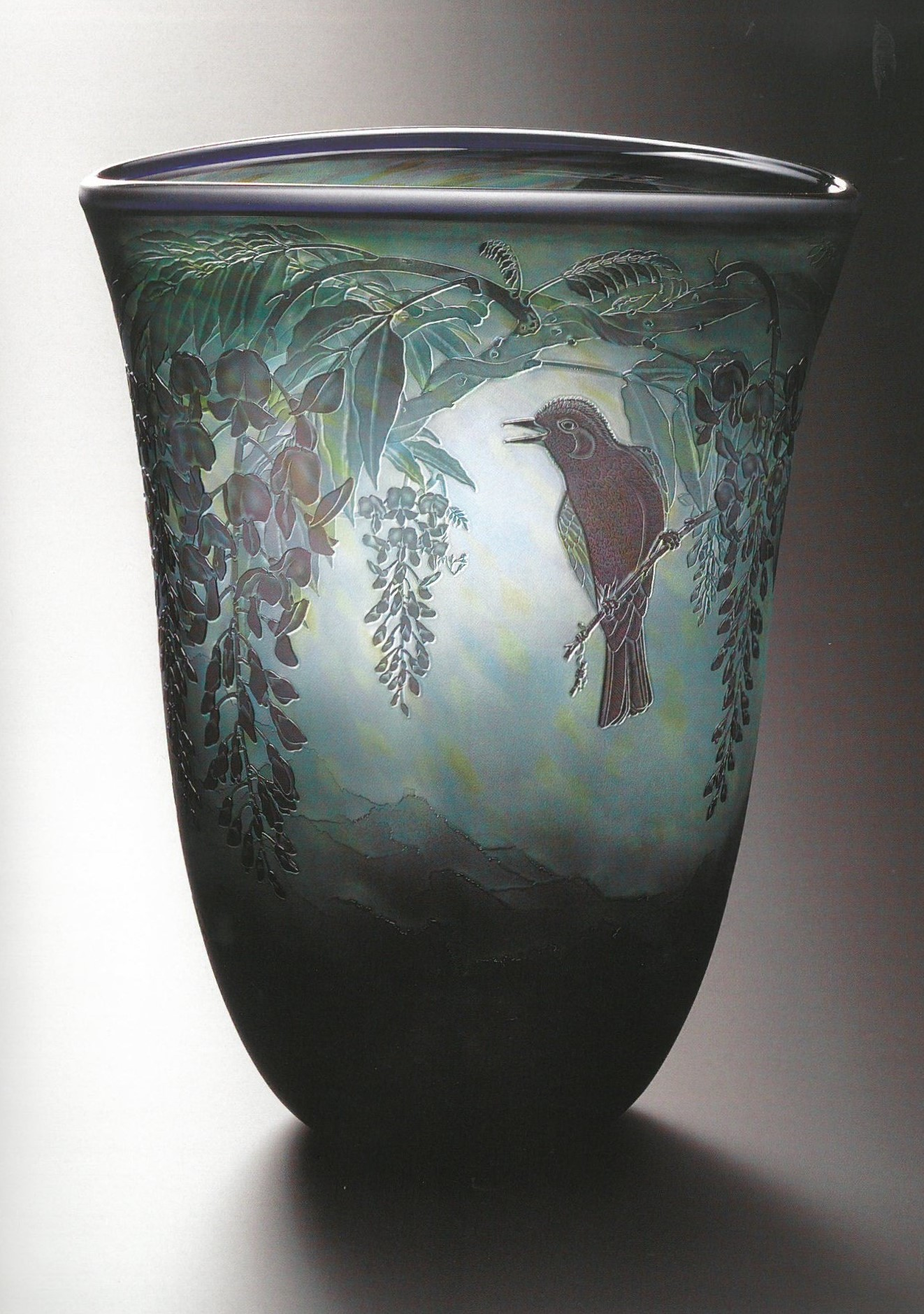 八層の着せガラスに３００回余りのサンドブラストを施した作品。 藤の花とヒヨドリ